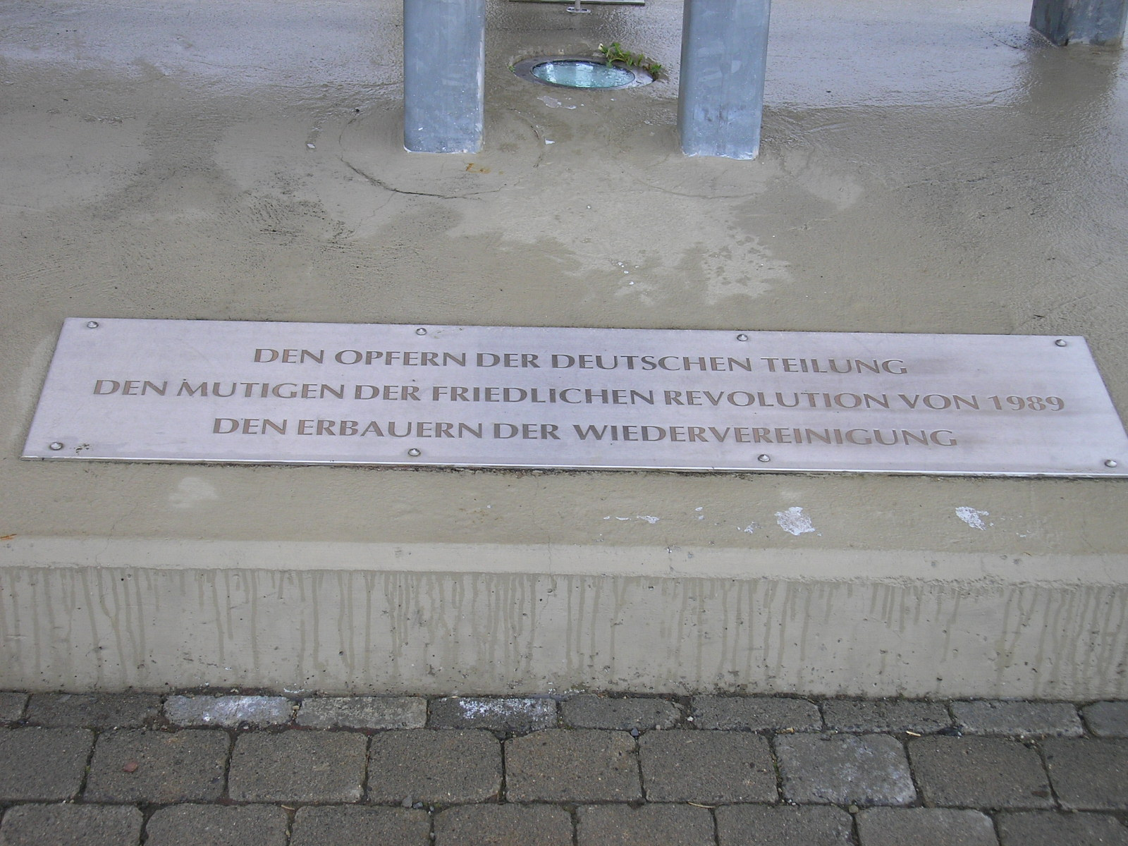 Inschrift am Denkmal am Point Alpha (Rhön).